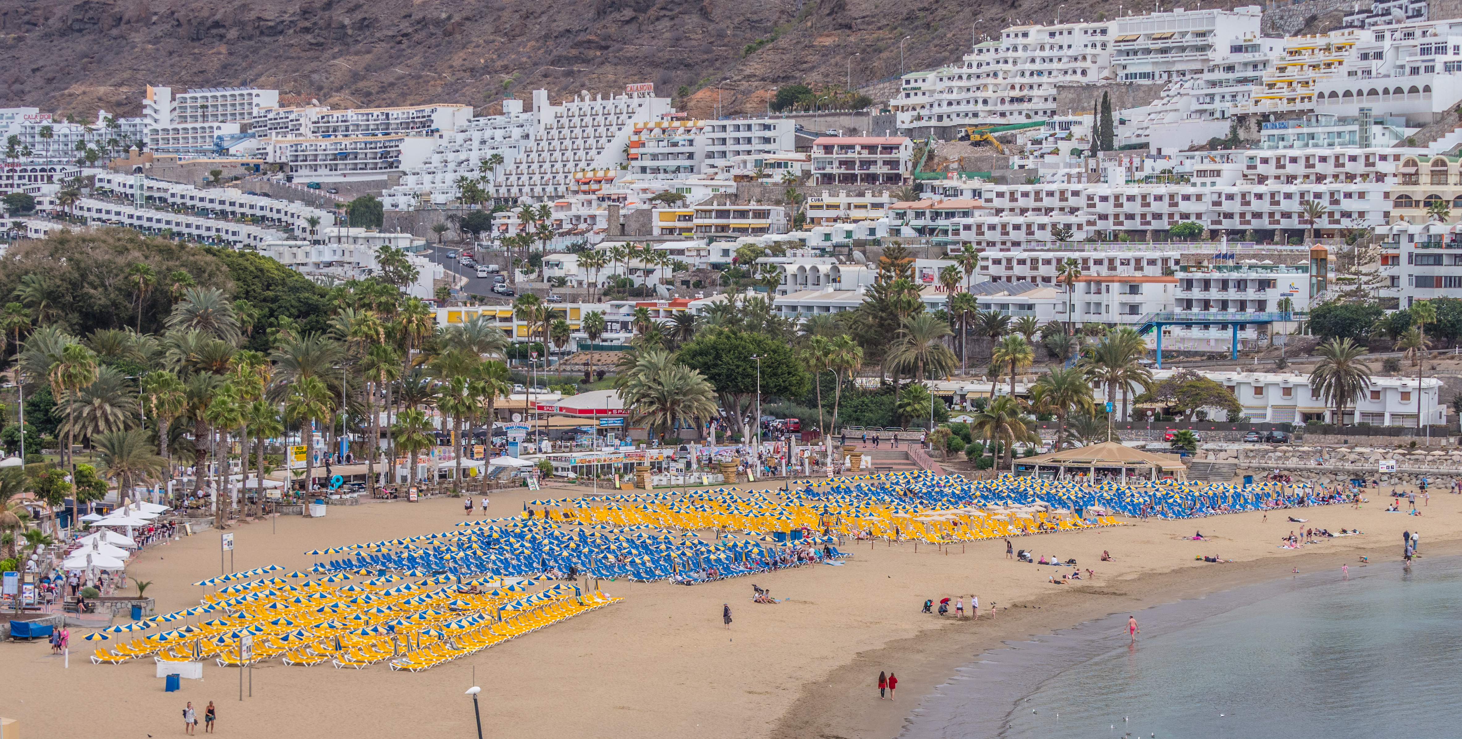 Puerto Rico, Gran Canaria, February 2018